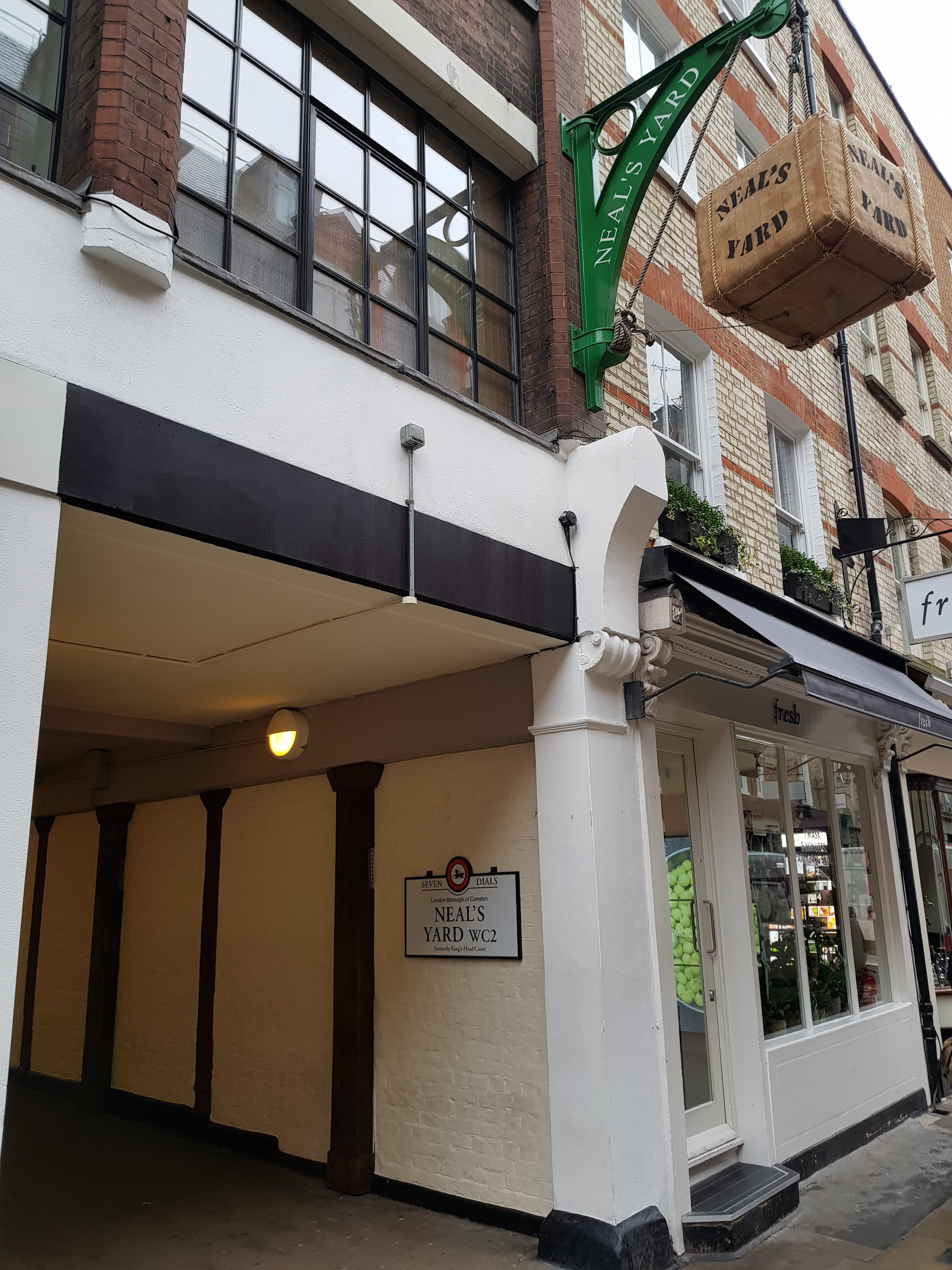 15 Monmouth Street : accès à Neal's Yard.